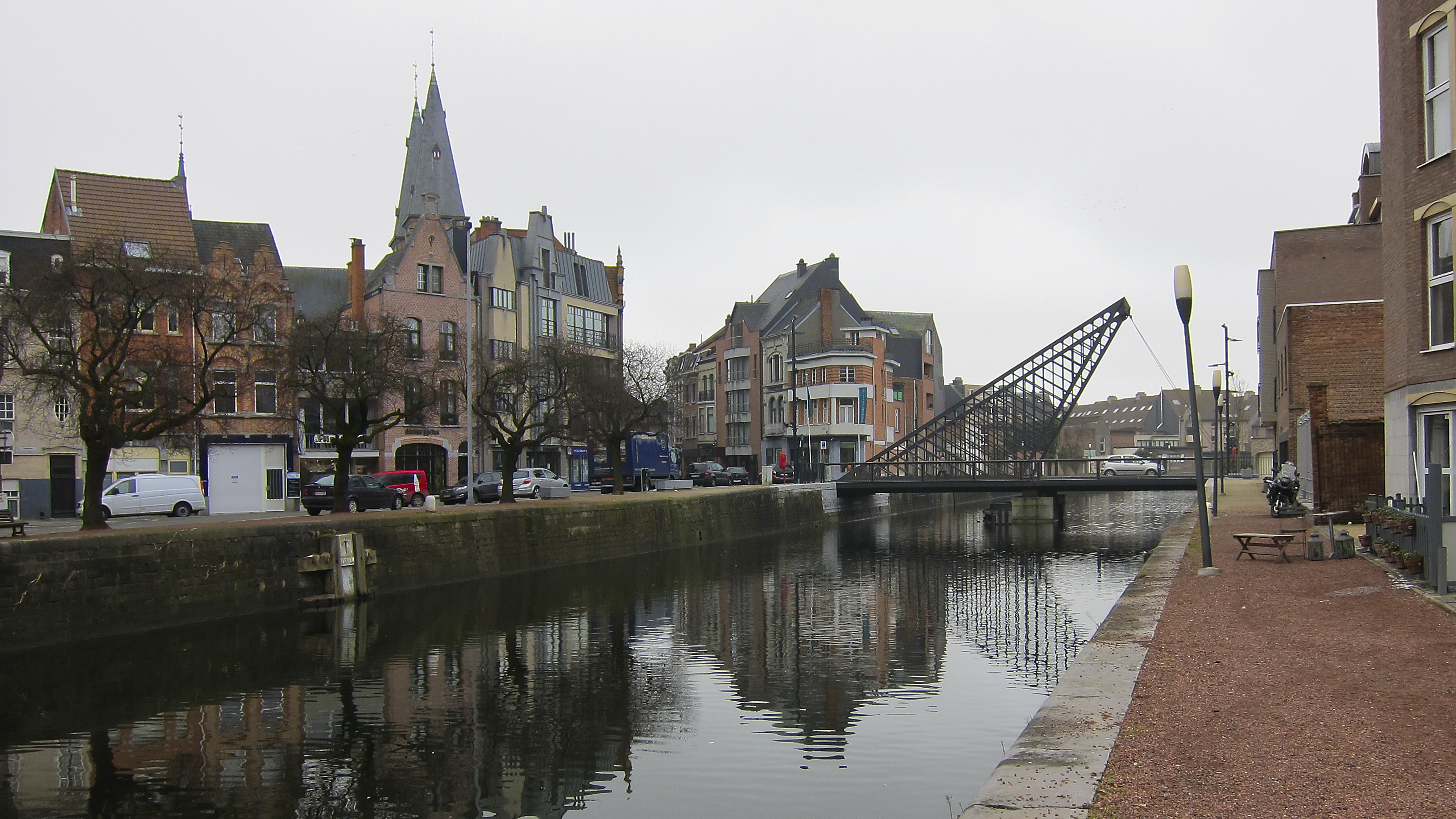 De brug over de Dender (Tragel) in Dendermonde (België)